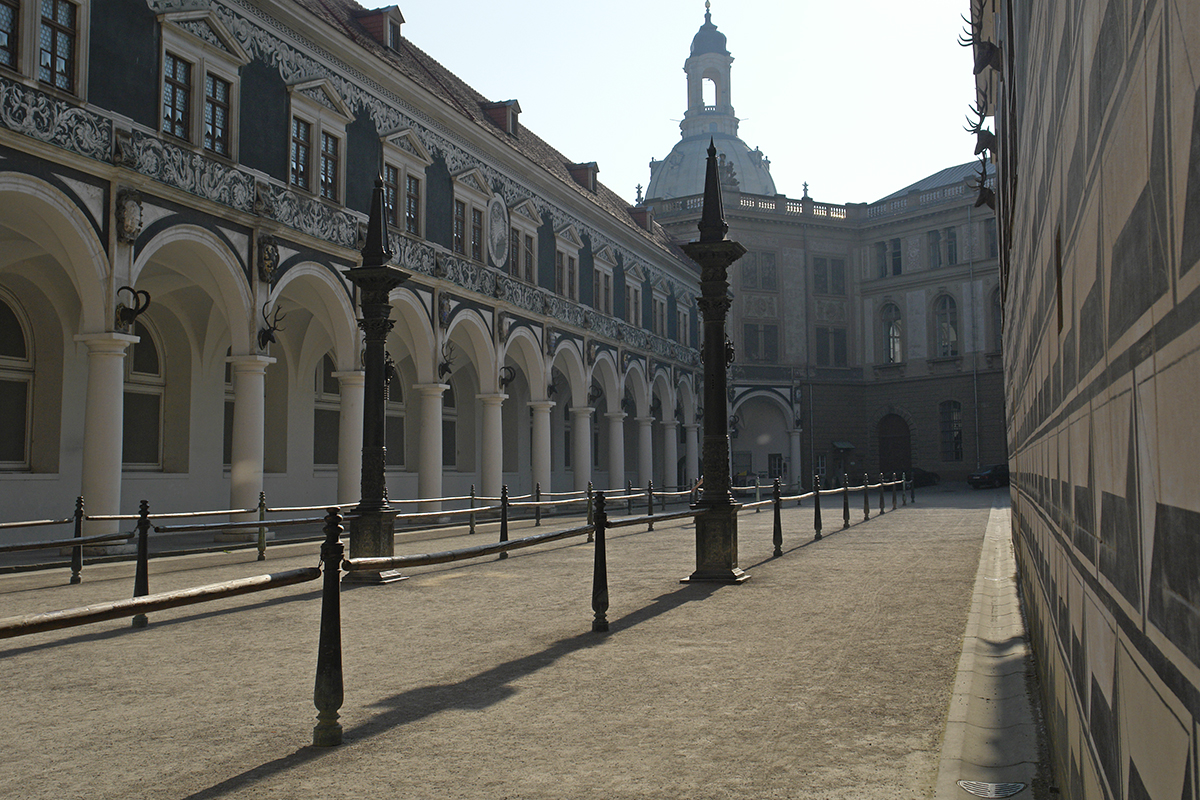 Dresdner Schloss, Stallhof (2006)